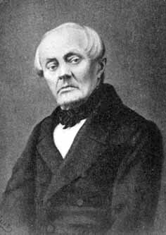 Stepan Shevyriov (1806-1864)